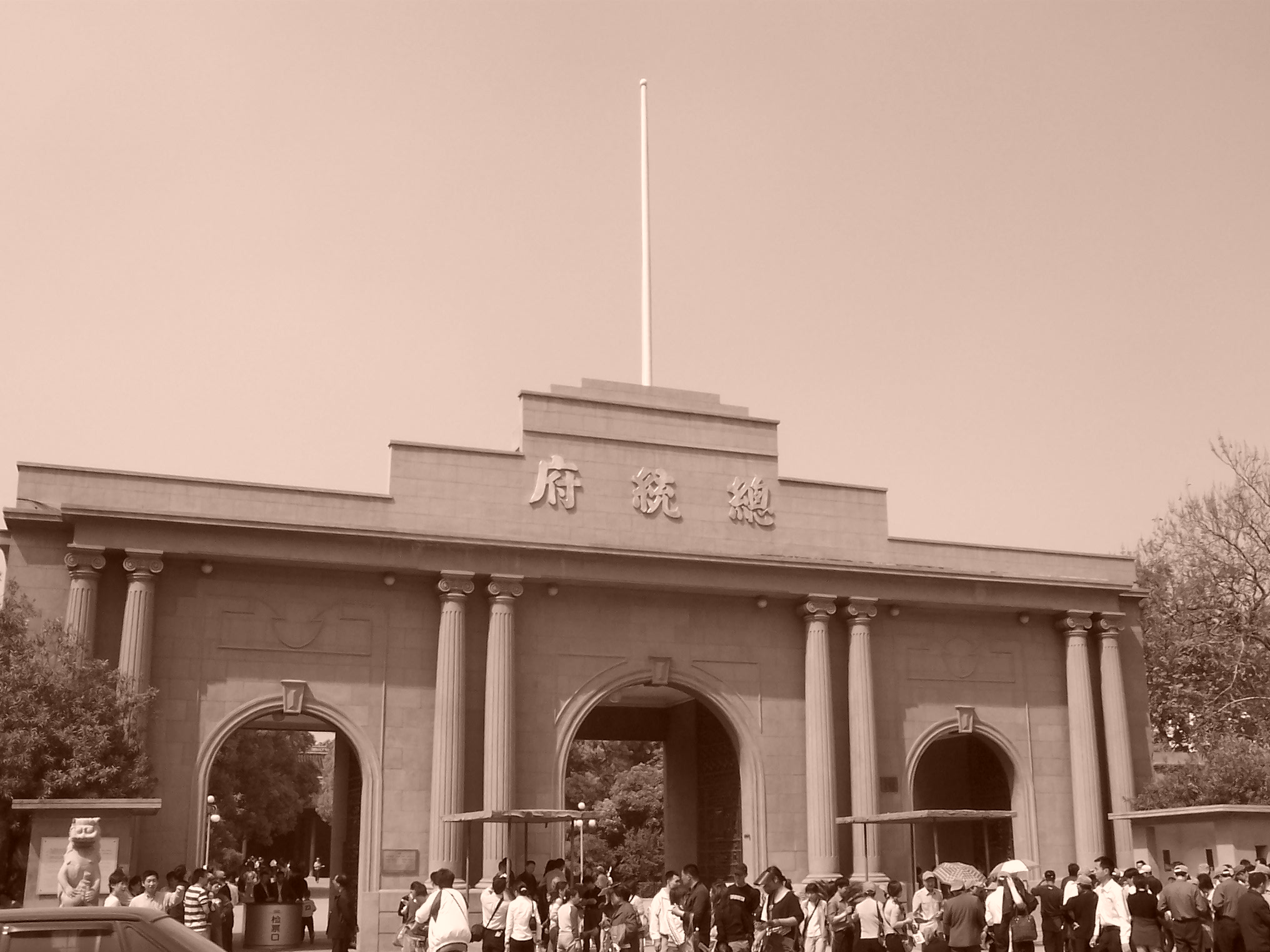 摘要 南京总统府 许可协议 2005年拍摄